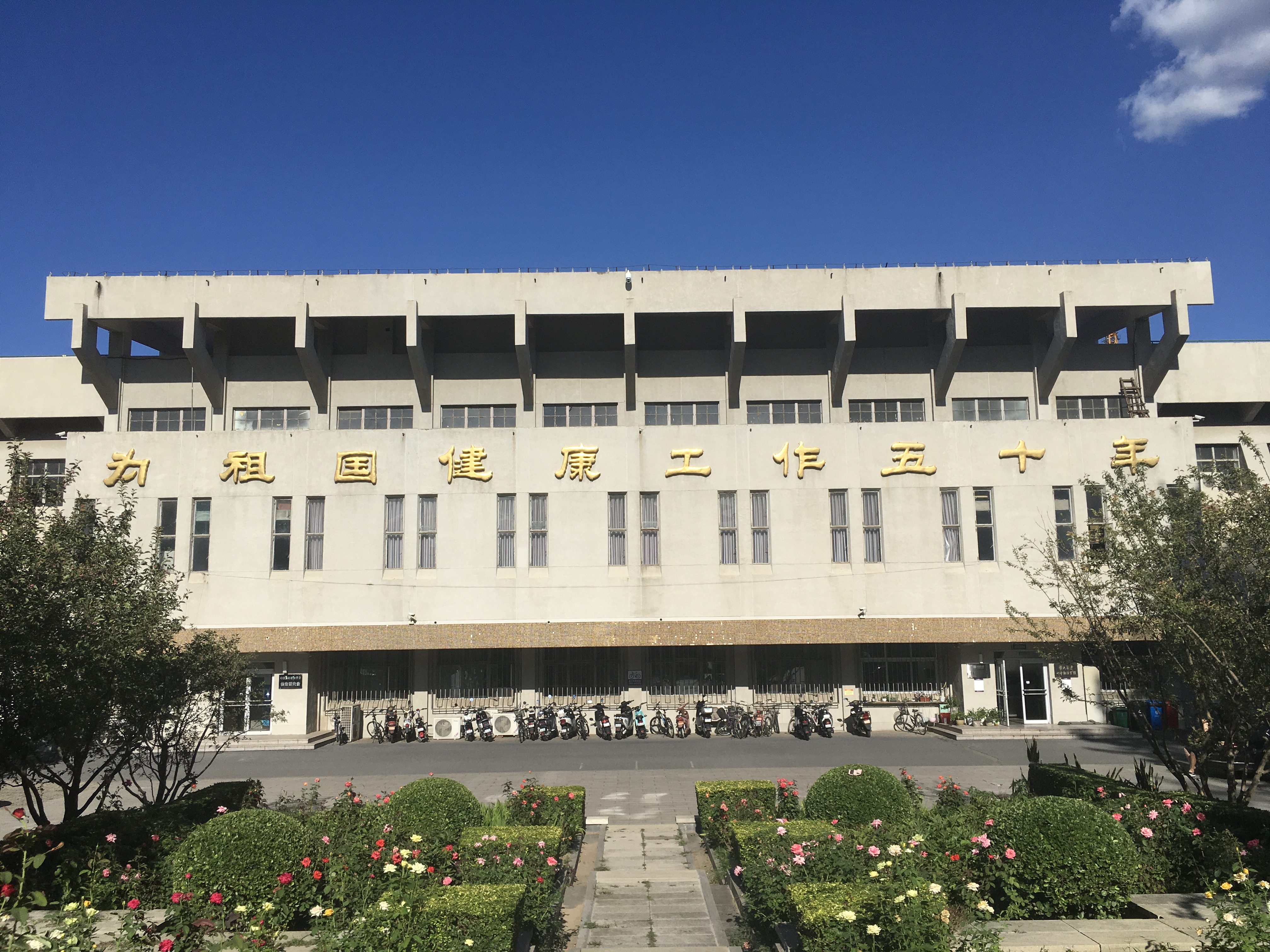 為祖國健康工作50年